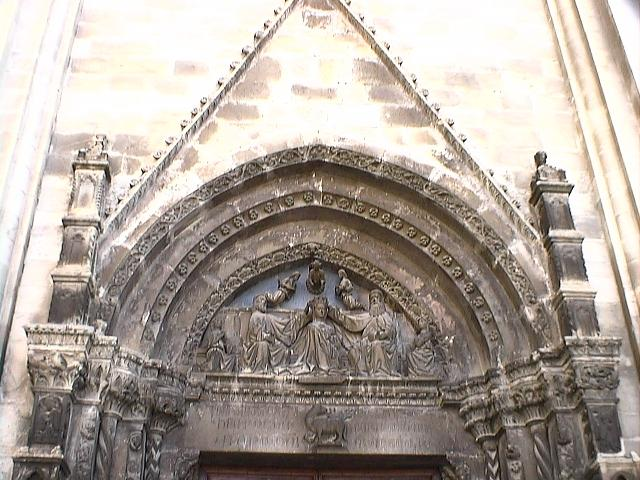 Autore Persico Tony Ernesto. 2005